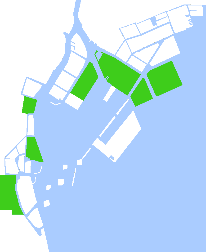 1922年～1935年に行われた第3期の隅田川口改良工事の対象地域